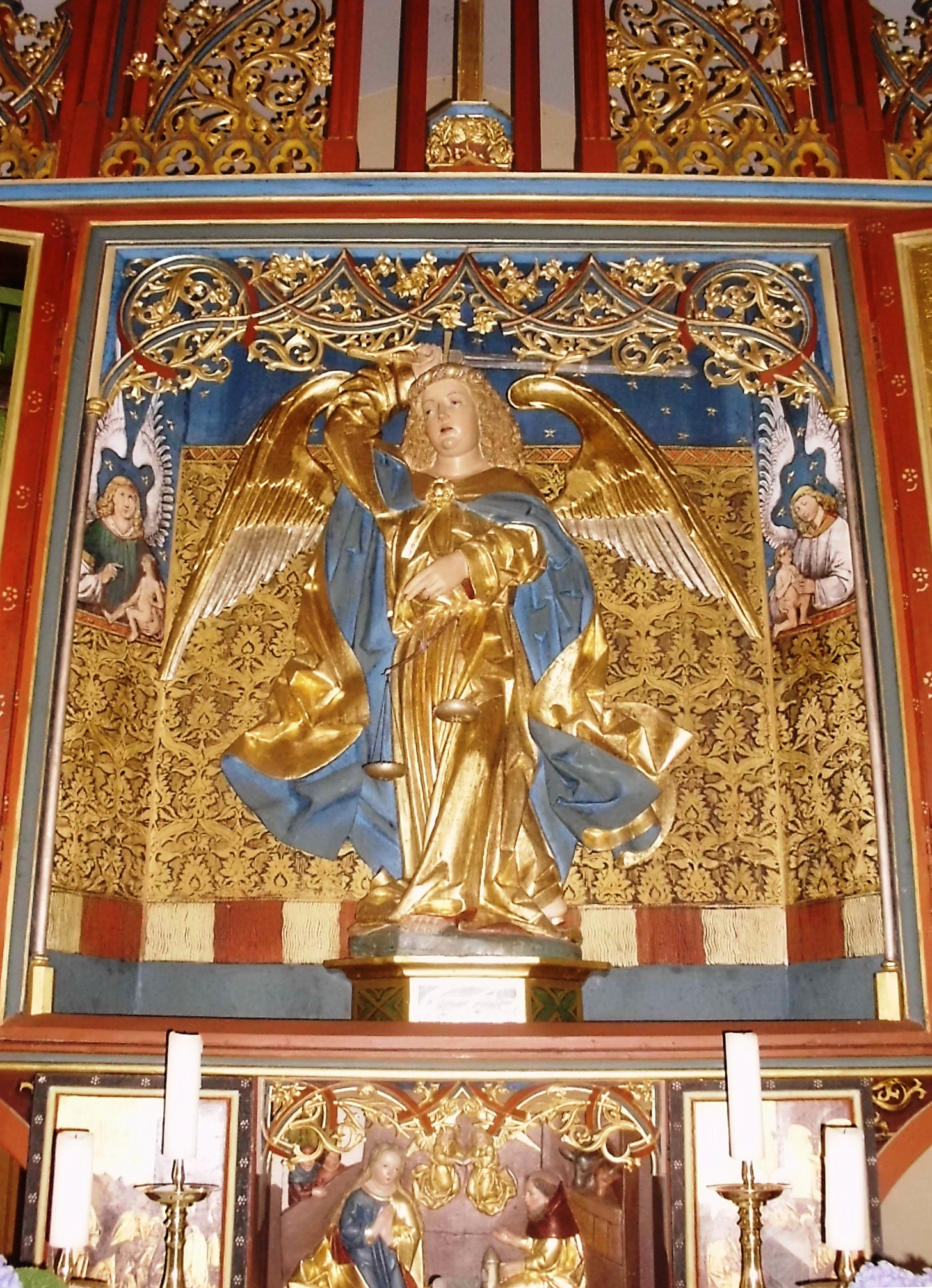 Sausenhofen, Ortsteil von Dittenheim in mittelfränkischen Landkreis Weißenburg-Gunzenhausen (Bayern), Evang.-Luth. Kirche St. Michael, Detail vom spätgotischen Altar (Erzengel Michael als Seelenwäger)